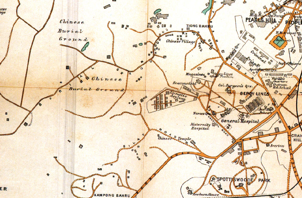 Karte von Singapur von 1913 mit der Umgebung des Tempels Heng San Teng (im unteren Bereich, etwa mittig, als Chinese Temple verzeichnet) und der Friedhöfe Tiong Lama und Tiong Bahru; das SGH (Singapore General Hospital) mit seinen Einrichtungen ist ebenfalls zu sehen, wie zahlreiche weitere Friedhöfe.